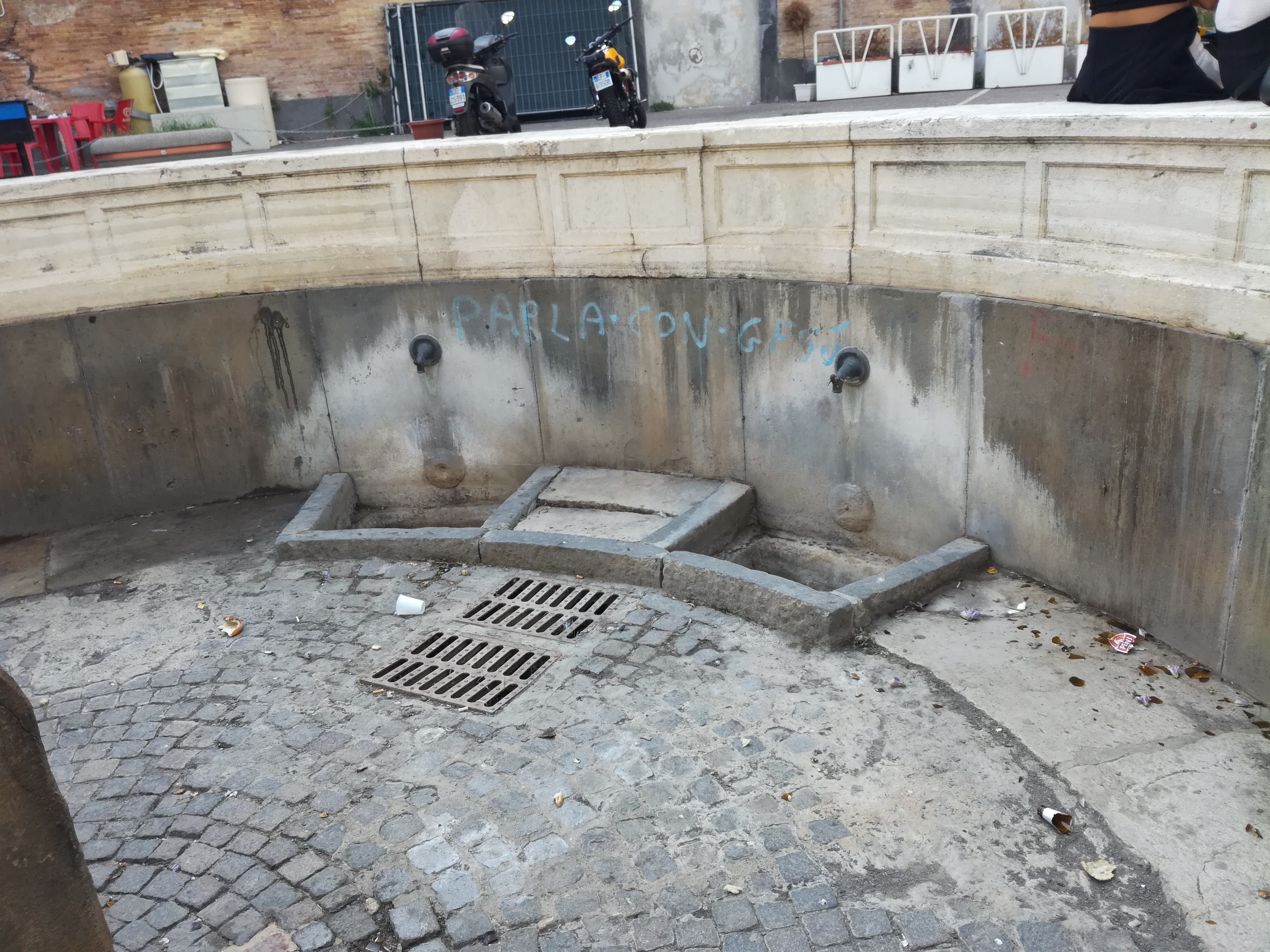 Fontana del Leone, Napoli